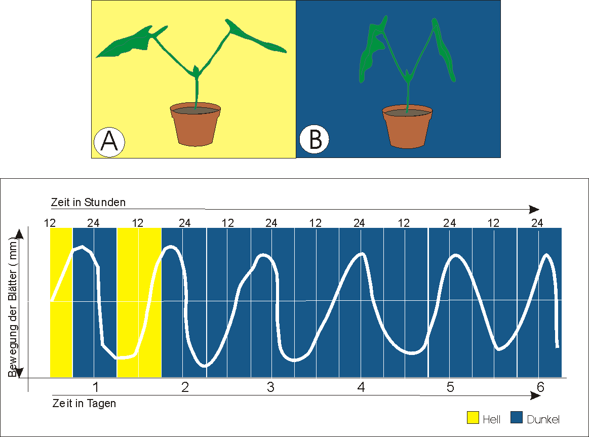 Schema Blattbewegung Bohne (Original text: Schematische Darstellung der Blattbewegung der Bohne im Licht-Dunkel(LD)/bzw. Dauerdunkel (DD))